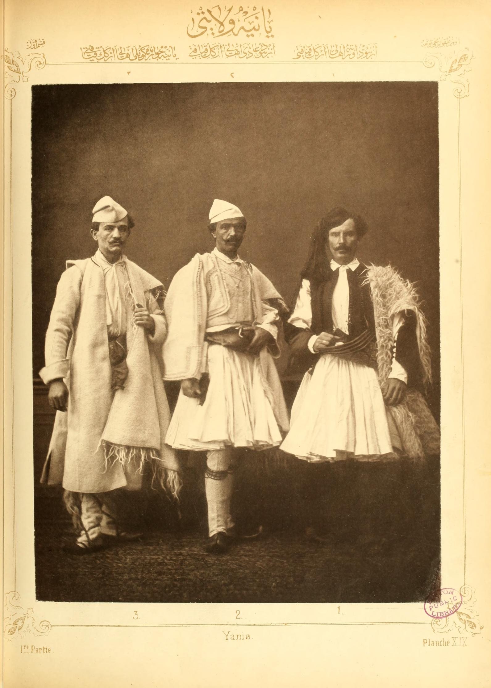 VILAYET DE YANIA PLANCHE XIX: Arnaout de Yanïa (classe moyenne) Arnaout de Yanïa (classe pauvre)